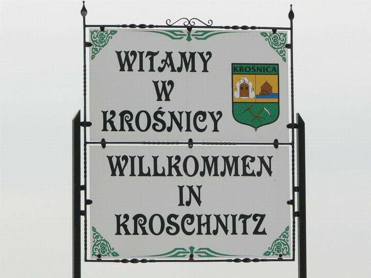 'n Tweetalige Pools-Duitse straatbord in die woiwodskap Opole.